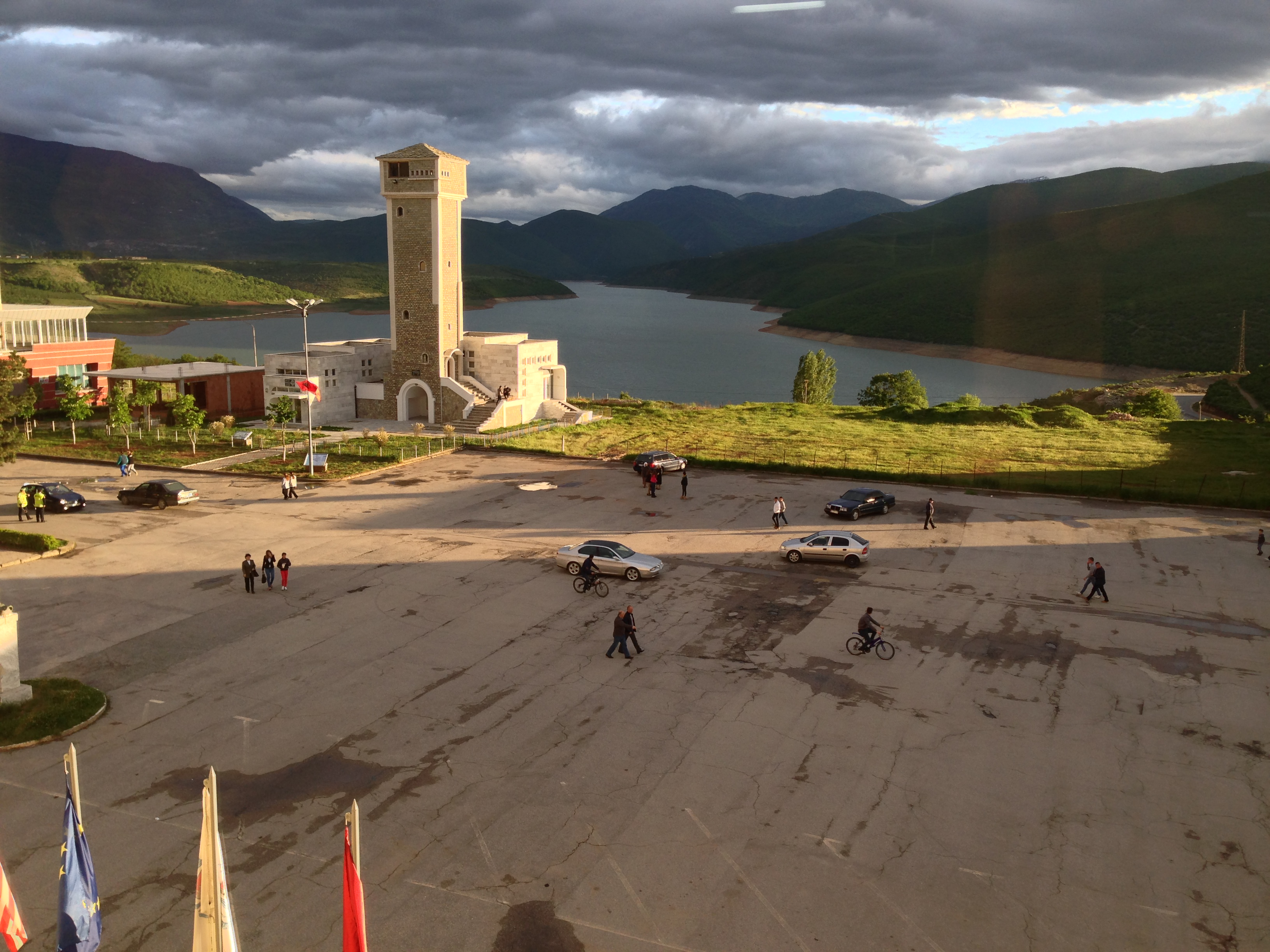 Foto e Sheshit kryesor te Bashkise Kukes ku ndodhet edhe memoriali i eksodit te shqiptarve te Kosoves